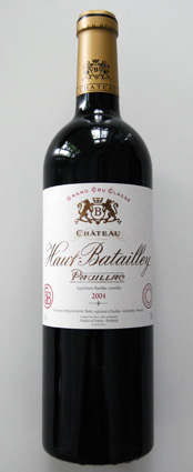 Aufnahme einer Weinflasche Château Haut-Batailley 2004